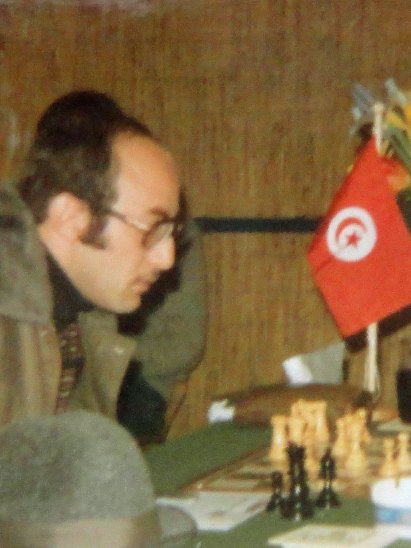 Slim Bouaziz, Dortmunder Schachtage 1979, Runde 7.